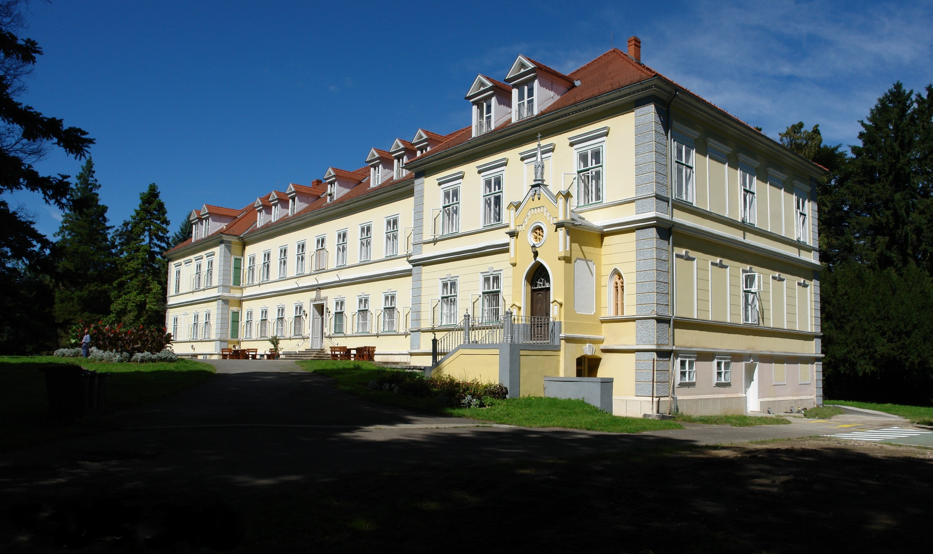 Ivánc, Sigray-kastély This is a photo of a monument in Hungary, Identifier: 8938